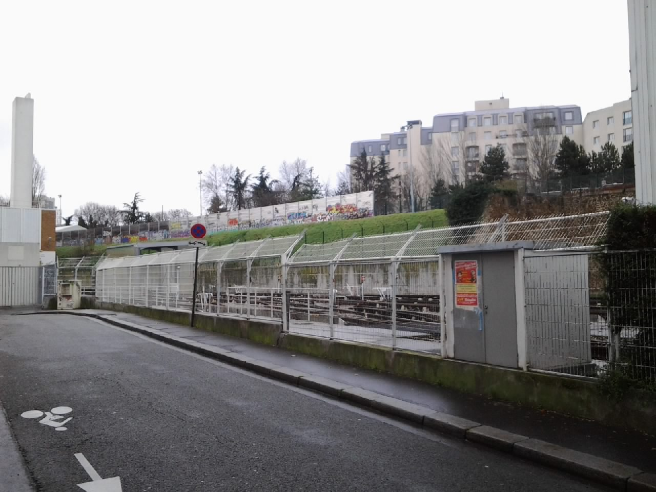 Gare de Charonne-Marchandises (Paris 20e) vue depuis le passage de Lagny. 27 décembre 2013.